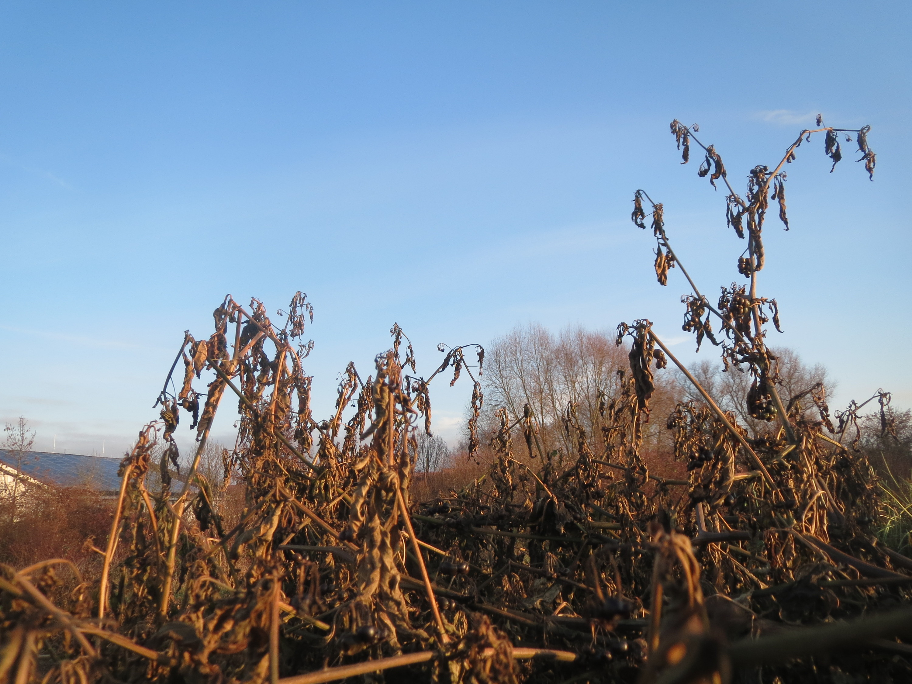 Schwarzer Nachtschatten (Solanum nigrum) in Hockenheim - typische Ackerrand-Vegetation auf sandigen Böden - im Dezember fällt der Nachtschatten in sich zusammen